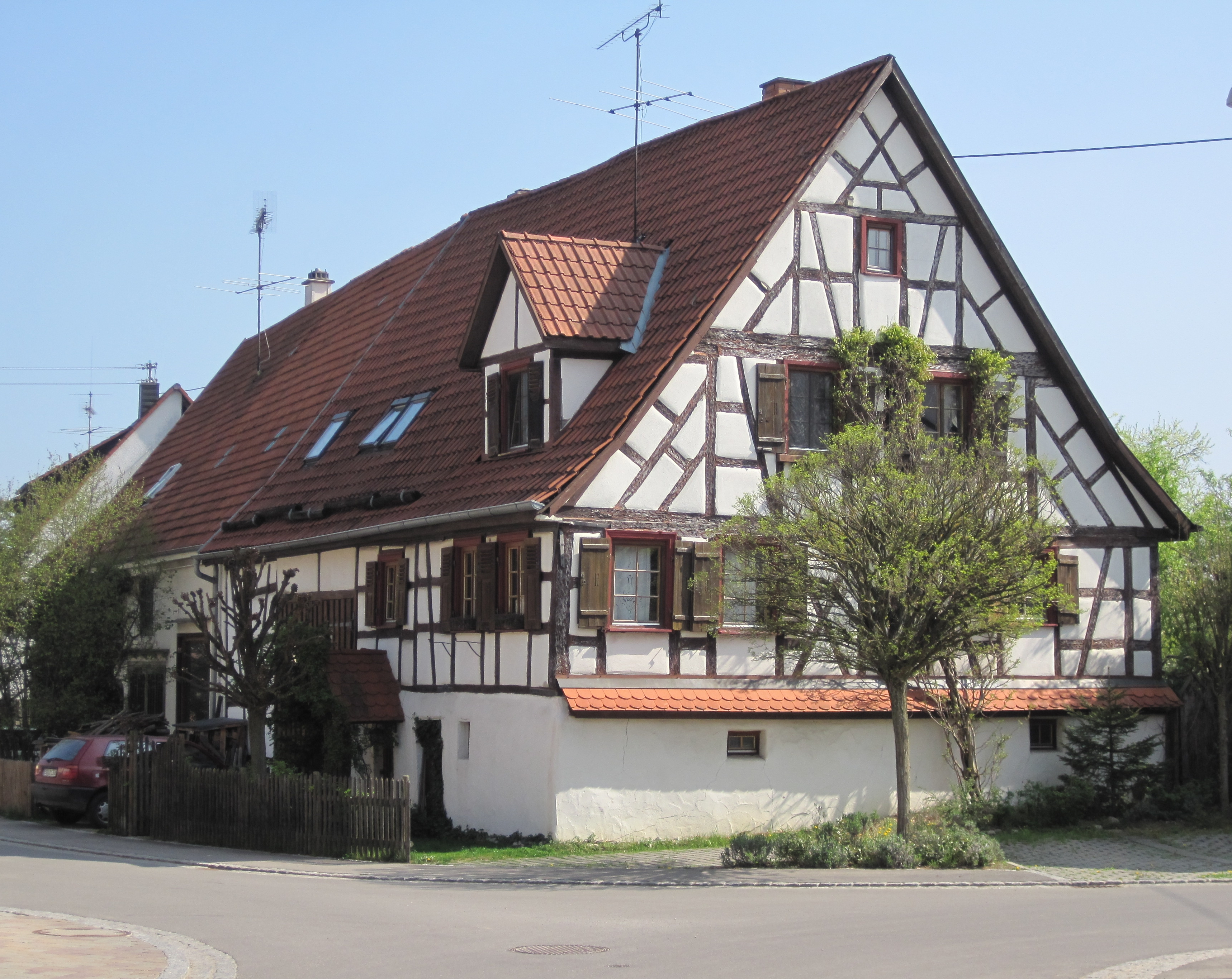 Fachwerkgebäude in Raidwangen, Ortsteil von Nürtingen